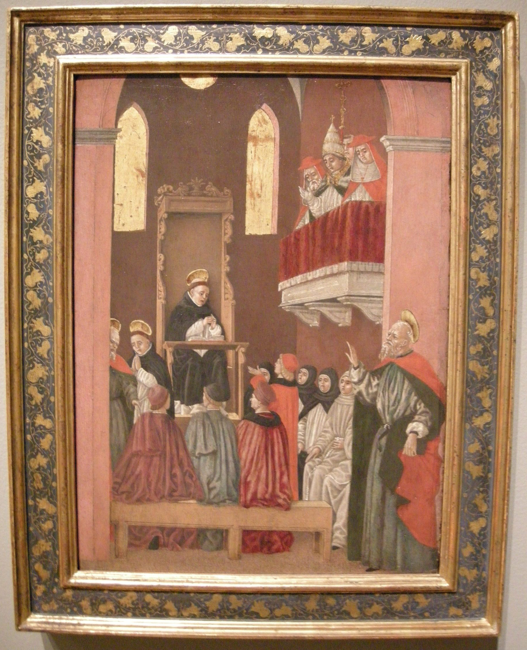 Bartolomeo degli erri, visione di san paolino, 1465 ca.